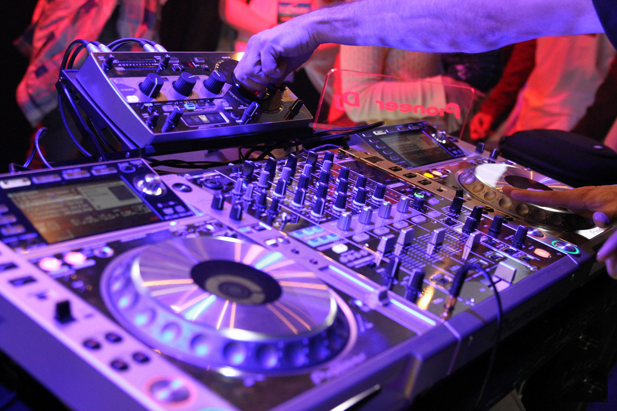 Expomusic 2014